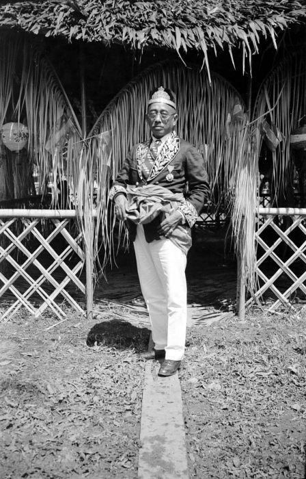 Negatief. De Maradia zelfbestuurder van Mamudju in gala costuum; res. Zuid Celebes, afd. Mandar, onderafd. en landschap Mamudju. De Maradia zelfbestuurder van Mamudju in galakostuum in Mandar, Celebes